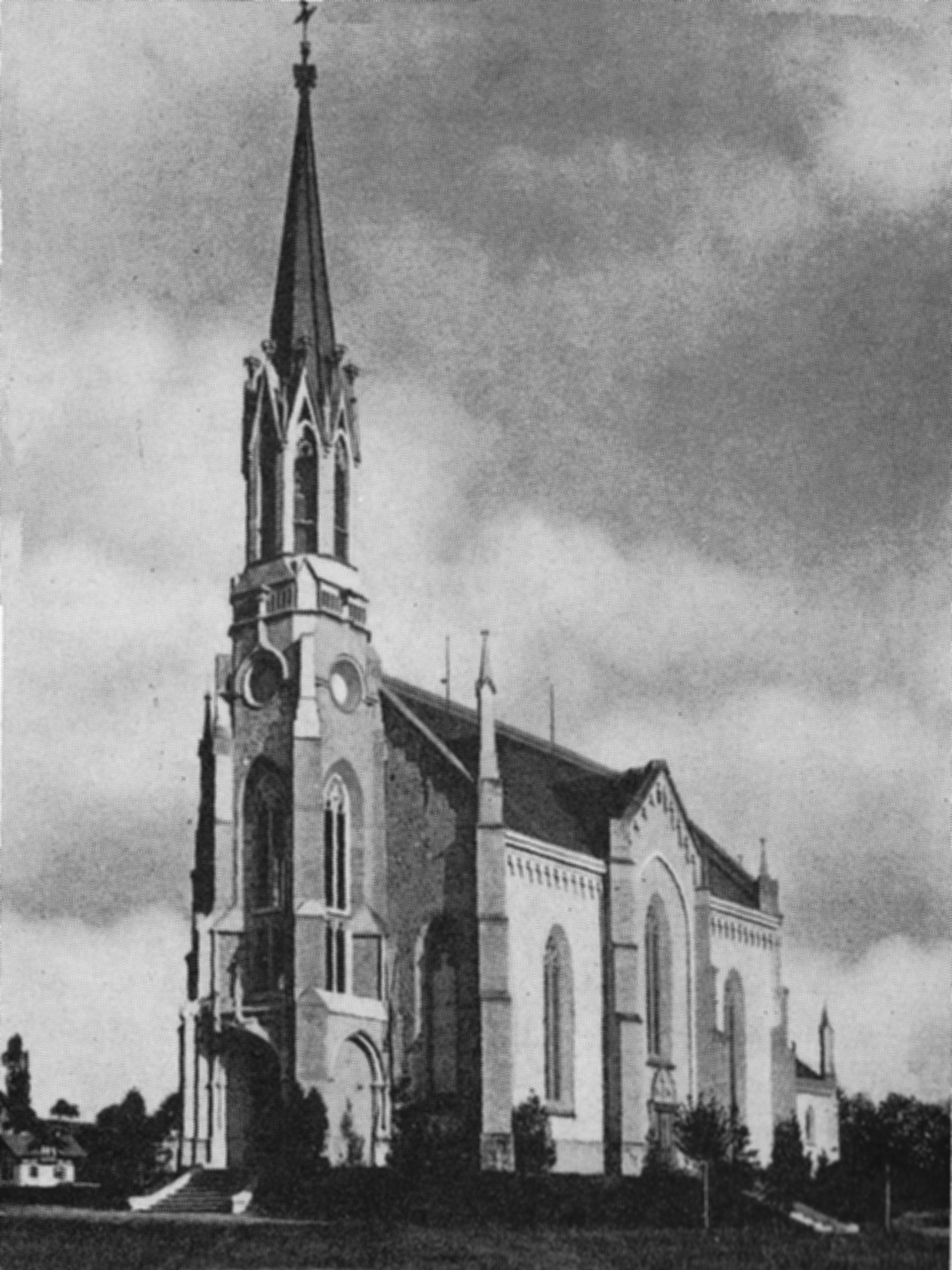 Römisch-katholische Pfarrkirche Uster, Vorgängerkirche Herz Jesu